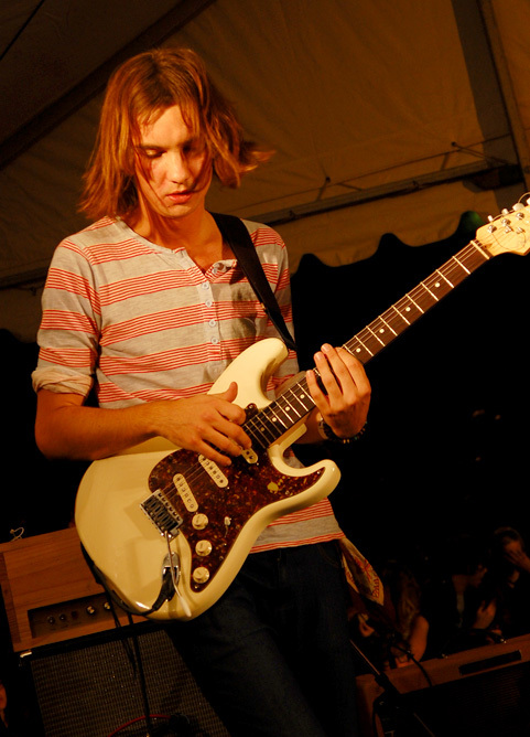 Tame Impala @ Somerville Auditorium (26/4/2009)